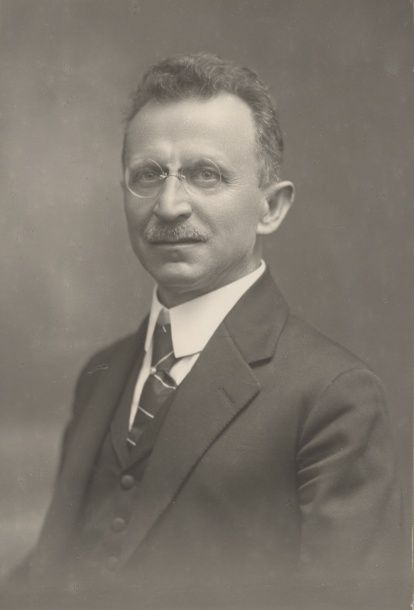 Karel Mareš (1872-1952), soudce a první český starosta Olomouce